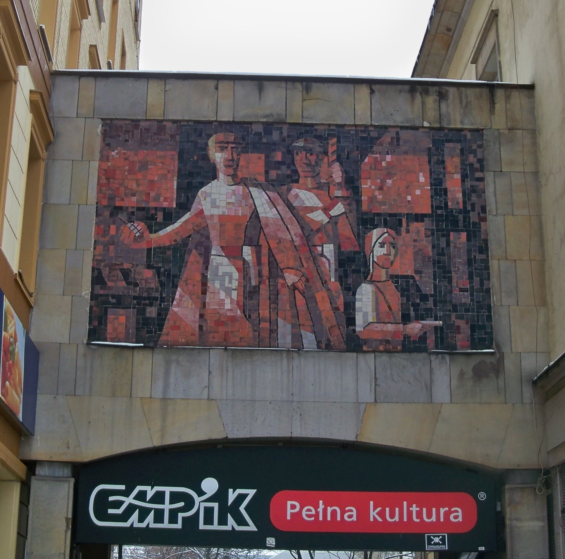 Łącznik między budynkiem przy Al. Jerozolimskich 28 a ul. Nowy Świat 15/17. Mozaika z roku 1964 przedstawiająca atak Gwardii Ludowej na "Cafe Club" tylko dla Niemców. Zaprojektowana przez Władysława Zycha.